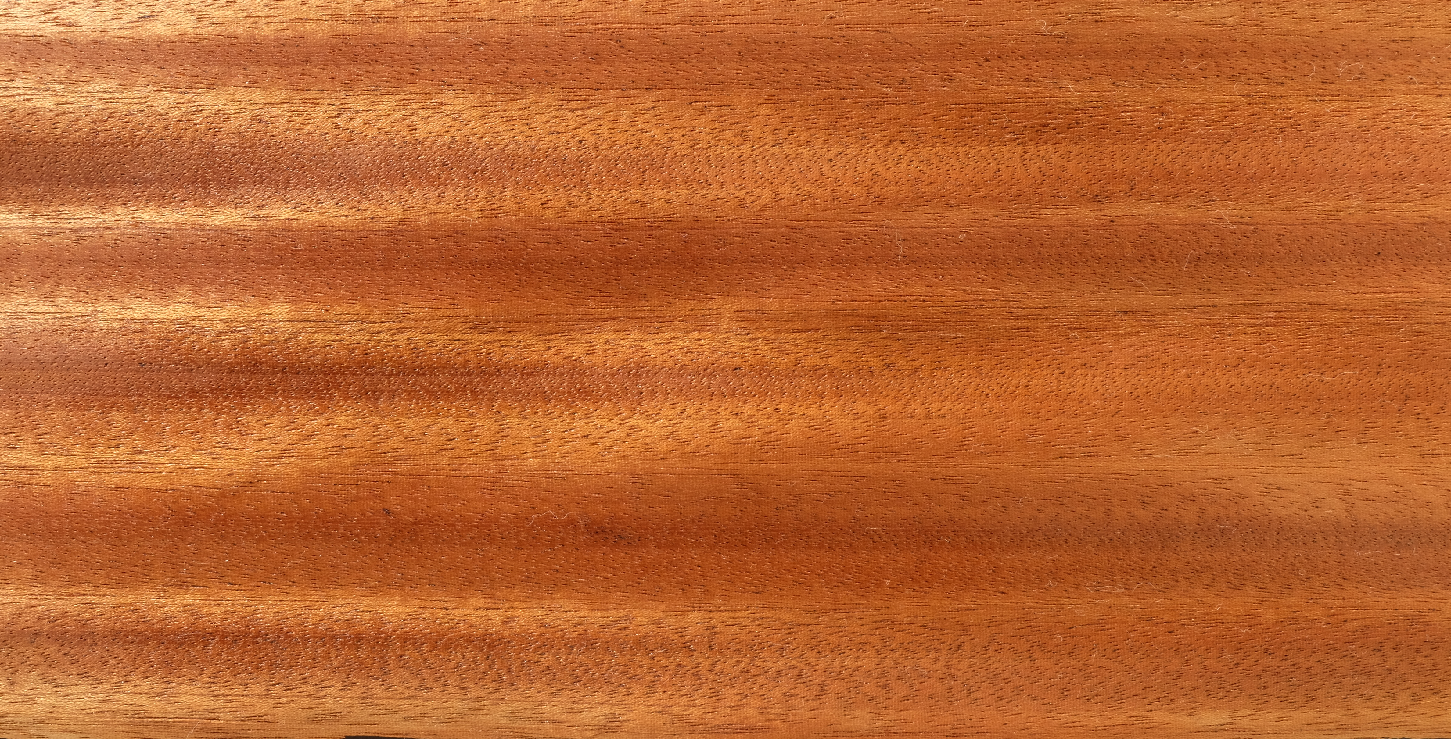 gemessertes Furnier; Holzart: MAS, Sapelli-Mahagoni, Aboudikro, Lifaki, Sapele